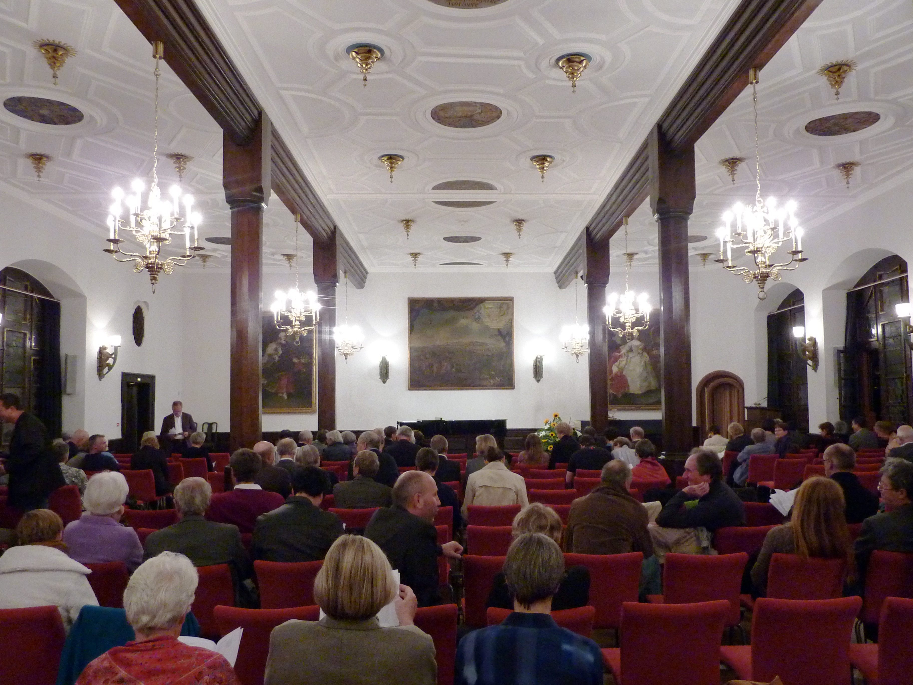 Der Kaisersaal im Historischen Kaufhaus, Freiburg, hier während der Pause eines Liederabends fotographiert.